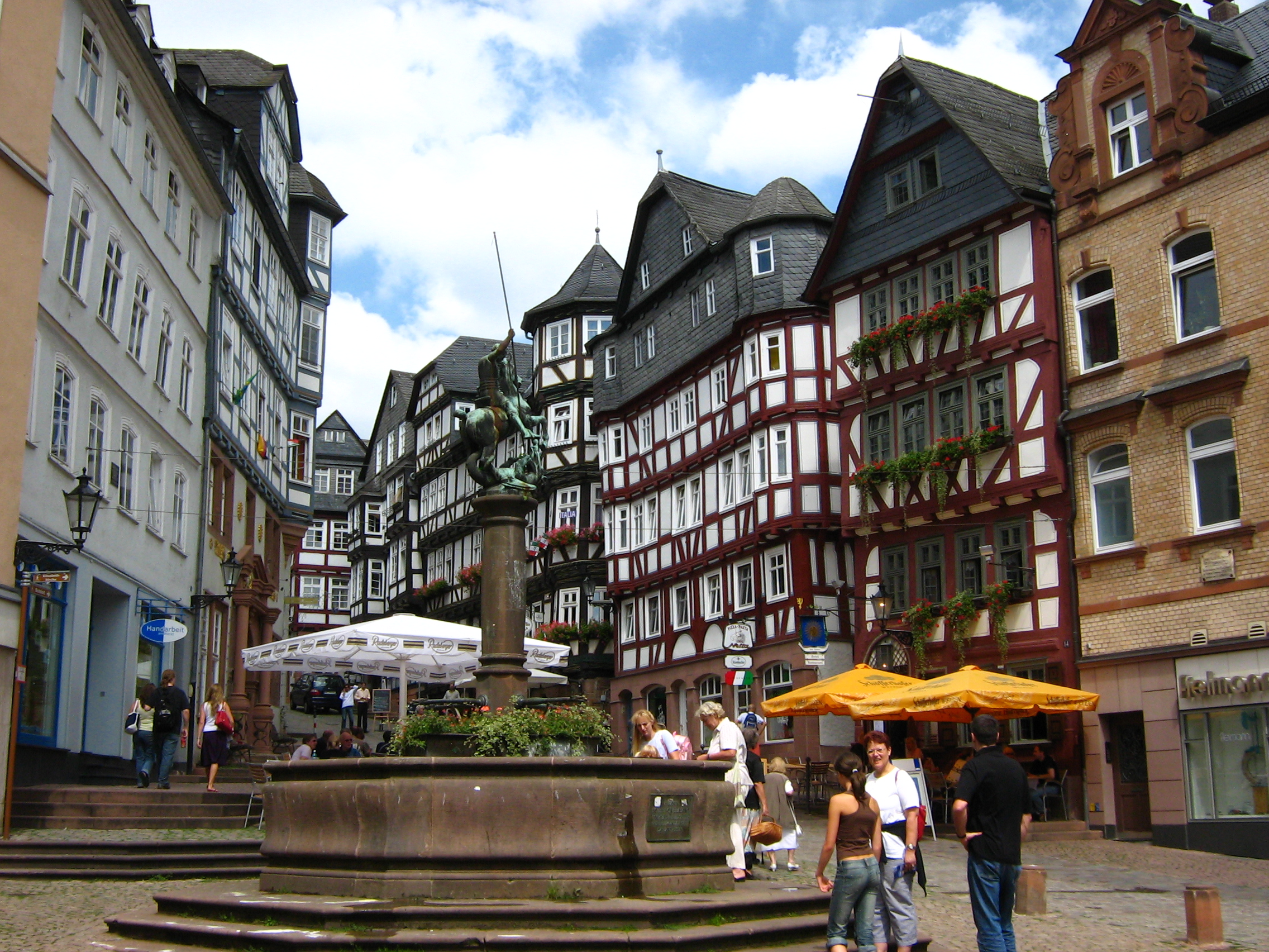 Marburg főtere, Németország